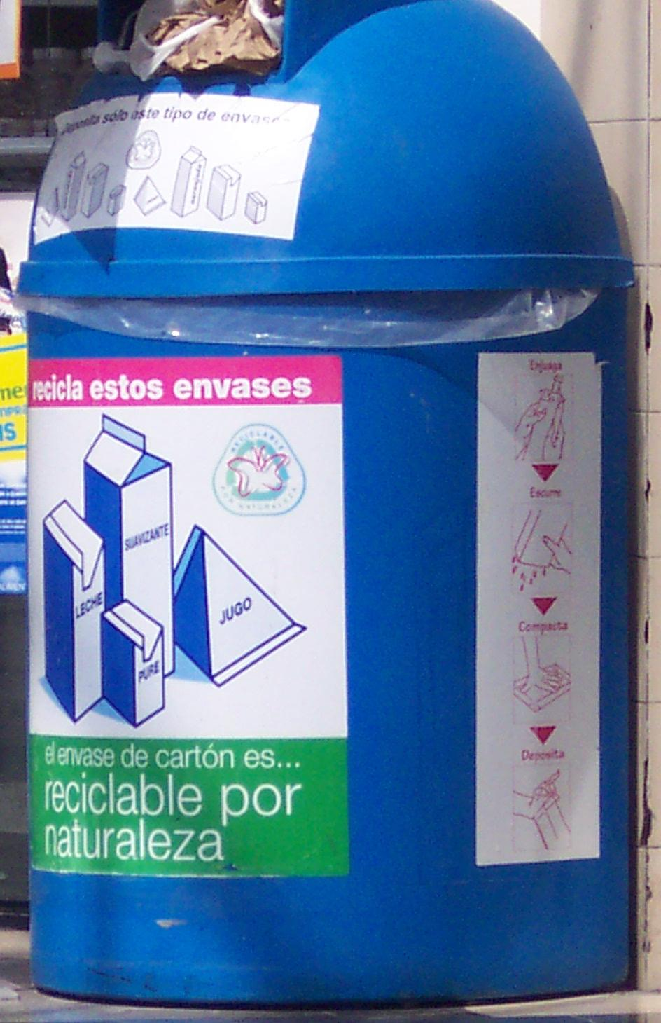 Image contains spanish text. Contenedor público para envases Tetra Pak. El objetivo es ofrecer un depósito público para el reciclado de este material.